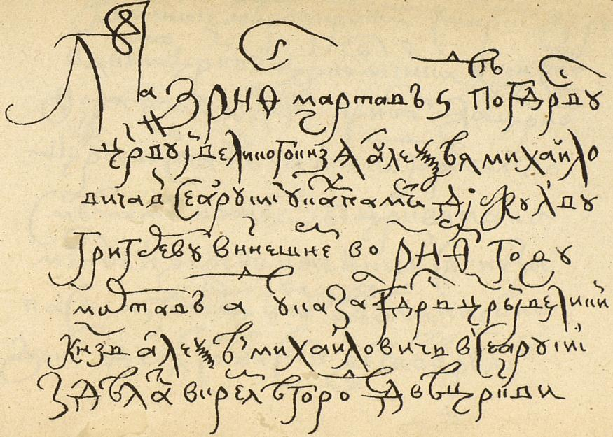 Лета 7159 марта в 6 день по Государеву Цареву и Великого Князя Алексея Михайловича Всеа Русии указу память диаку Лву Григорьеву. В нынешнем во 159-м году марта в 1 день указал Государь Царь и Великий Князь Алексей Михайлович Всеа Русии зделати в Кремле городе две церкви каменные мерою против старых деревянных церквей: церковь мученика Христофора, что у Холопья приказу, да церковь царя Костянтина, что под горою. А по сметам на те обе церкви на каменное и на деревянные и на всякие запасы и уговорщиком от дела надобно денег девятьсот восмдесят пять рублев.